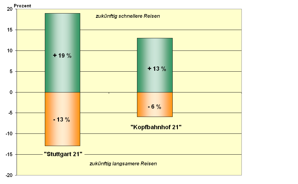 Entwicklung der Reisezeiten zwischen 159 Bahnhöfen im Raum Stuttgart nach Realisierung von "Stuttgart 21" im Vergleich mit "Kopfbahnhof 21" - Ergebnis einer sma-Studie von 2010